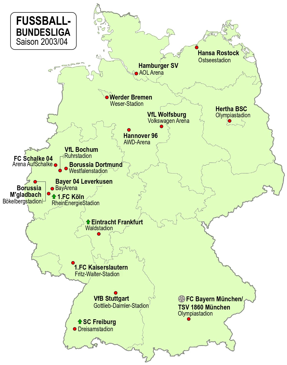 Karte der Vereine der Fussball-Bundesliga-Saison 2003/04